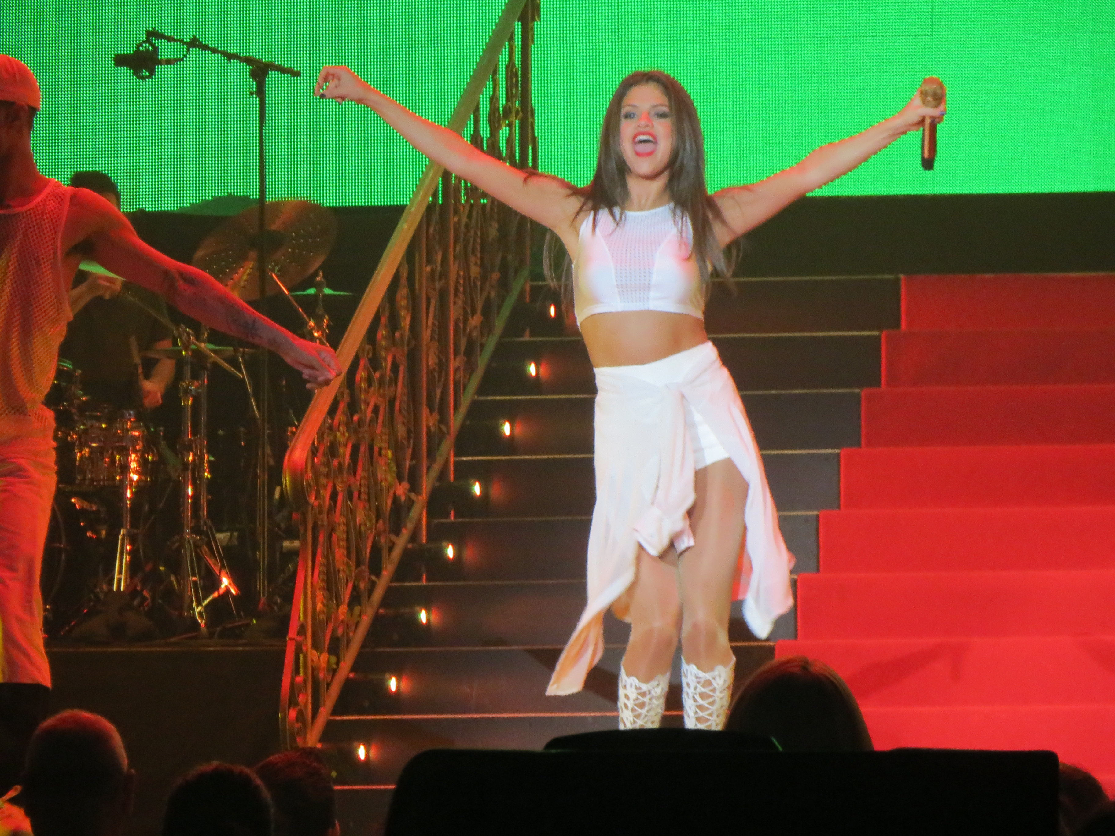 Selena Gomez StarsDance Nov 2013 San Diego, CA